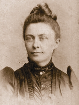 Fotografia da missionária estadunidense Martha Watts.